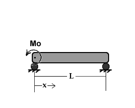 Viga con mimento aplicado al inicio